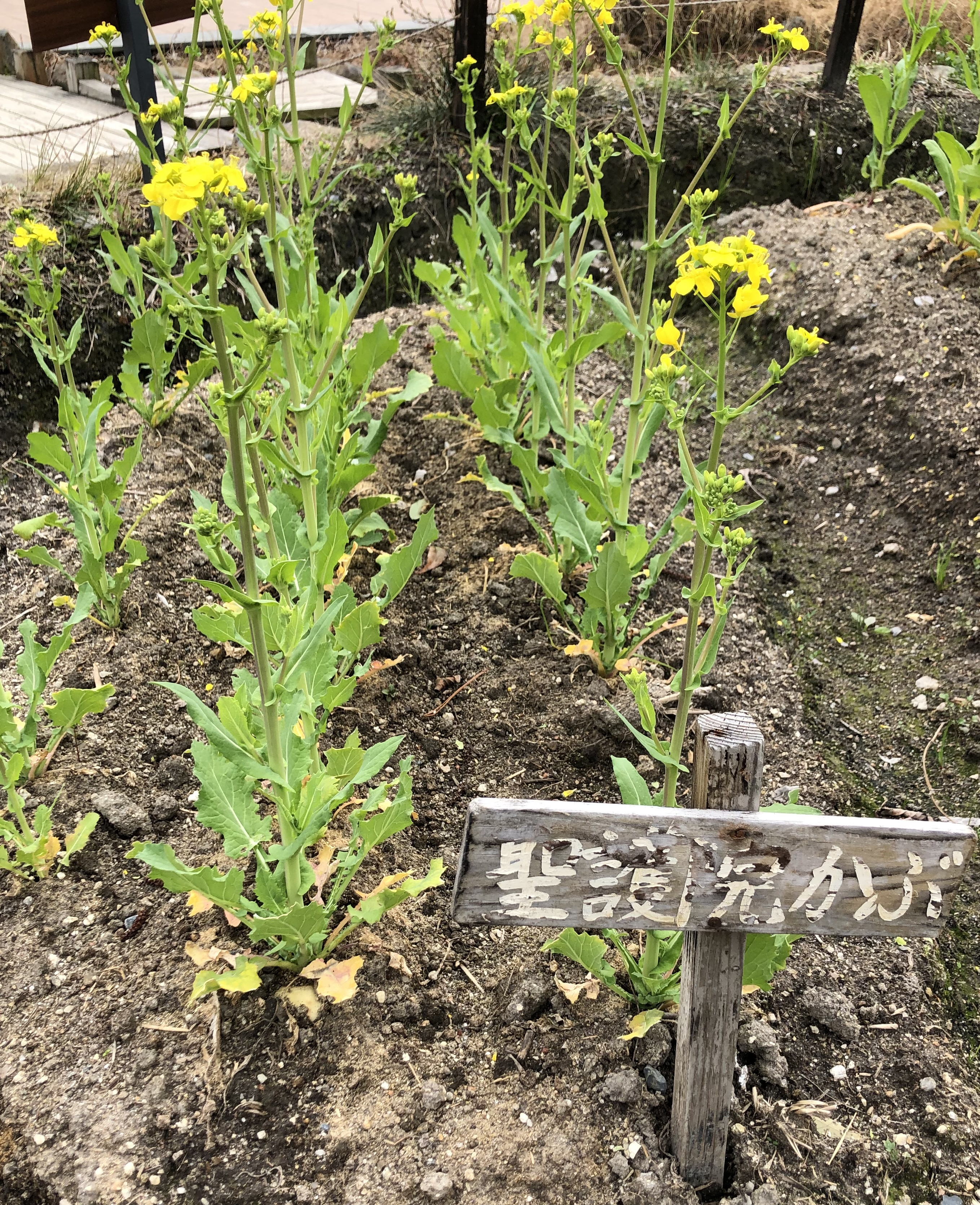 聖護院かぶ。京都水族館の「京の里山ゾーン」で栽培。